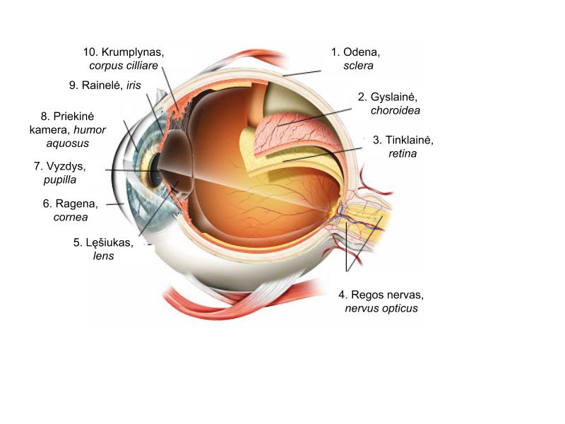 anatomy of the eye